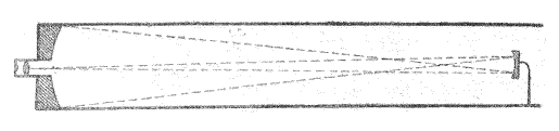 Fig. 1. - Coupe du télescope de Grégory pour La Nature, revue des sciences, n° 18, page 279.